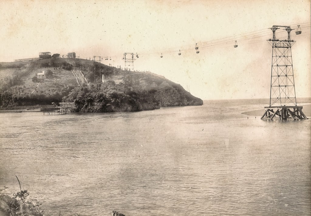 Orconera Iron Ore Company Limited - Aireko tranbia eta Pobeñako garbilekua Deskribapen zehatzak ikus ditzakezu hemen